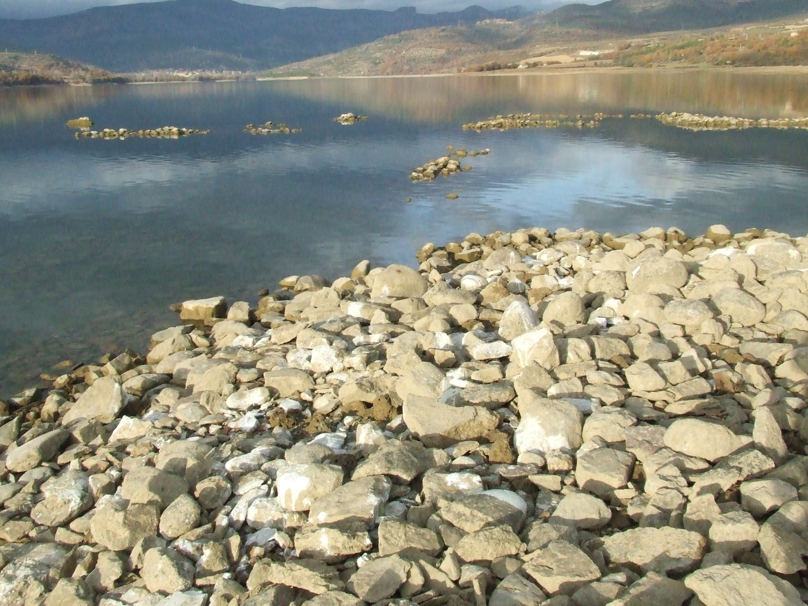 Sant Miquel (Aramunt, Conca de Dalt, Pallars Jussà)